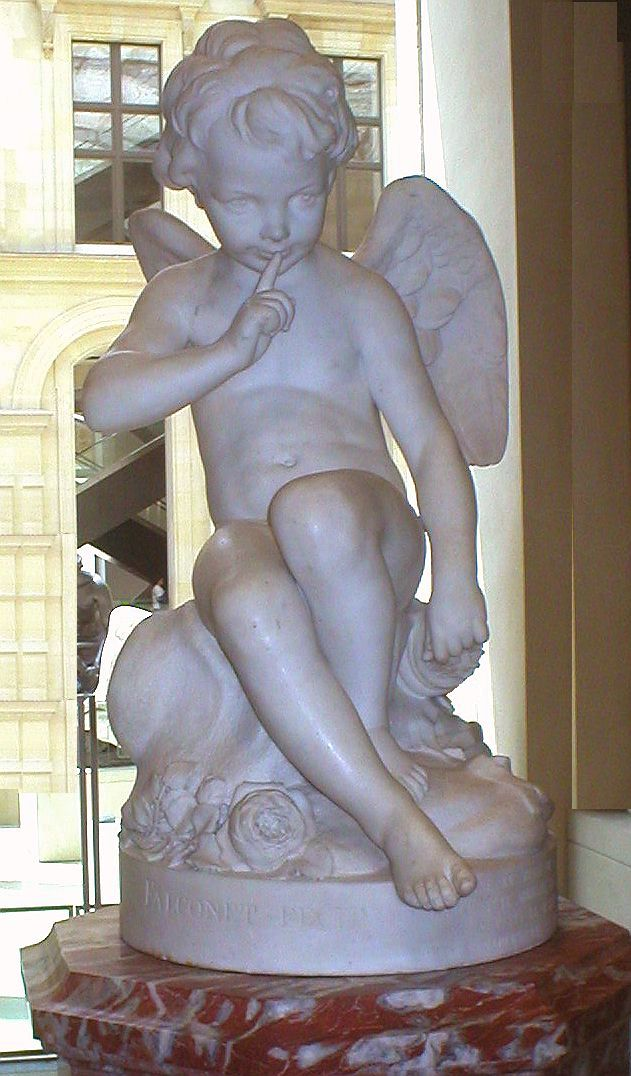 L'Amour menaçant, marbre, 1757, Etienne-Maurice Falconet, Musée du Louvre